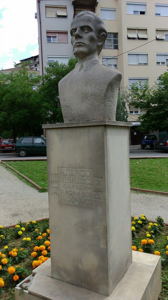 Статуа на Алексо Демниевски - Бауман во Велес